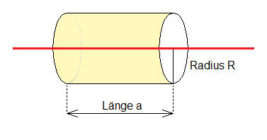 Gerader Kreiszylinder